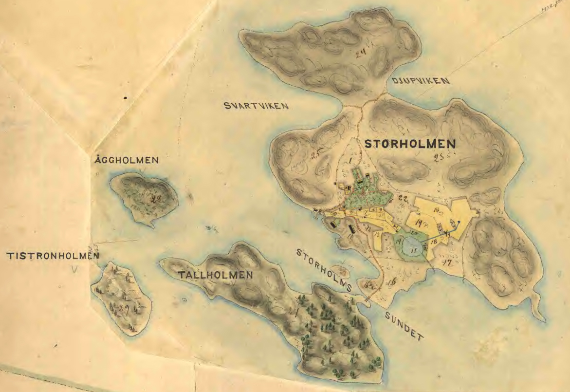 Storholmsöarna på en karta upprättad av lantmäteriet i Stockholms län 1875.